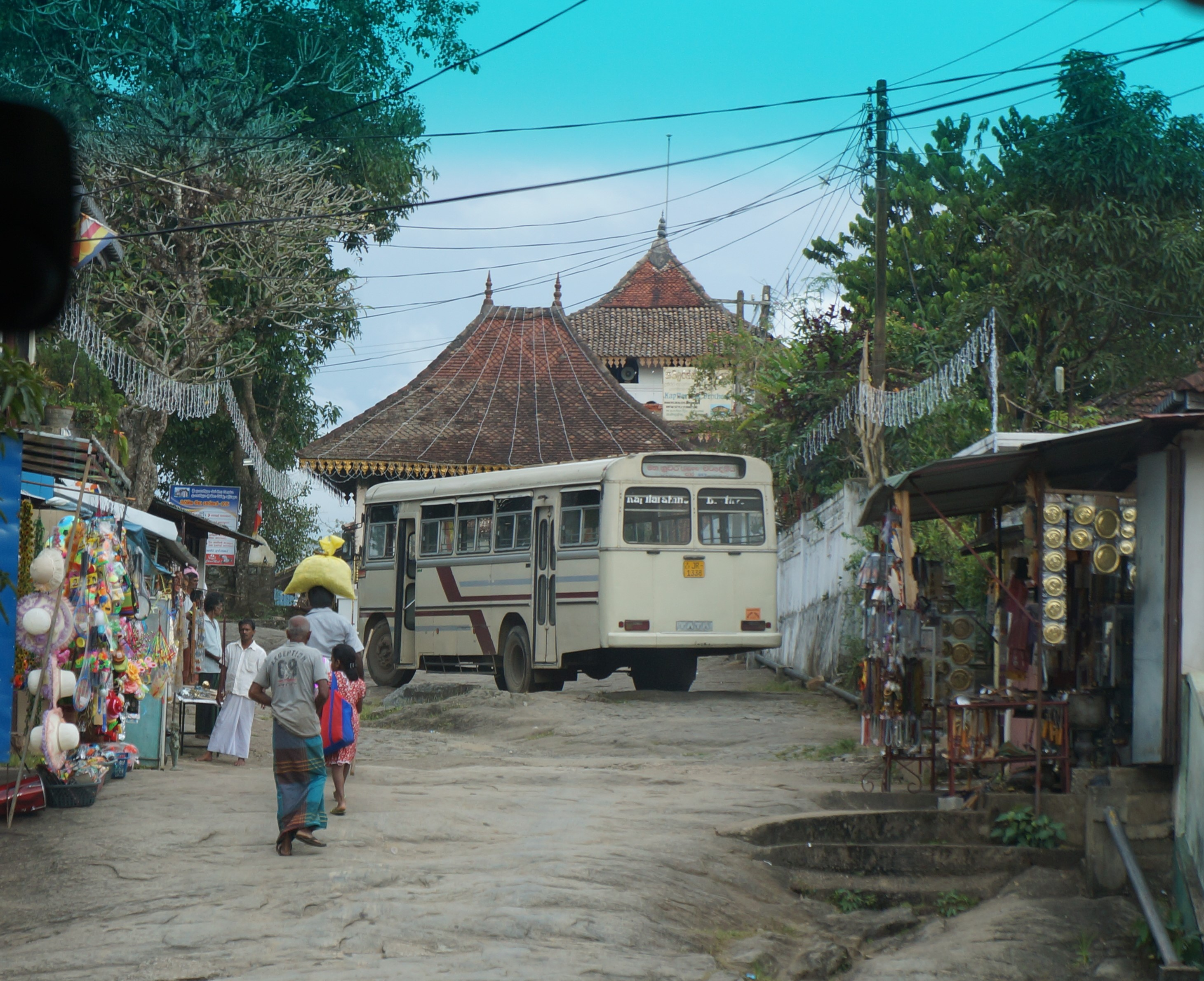 Le temple Lankathilaka Viharaya à Kandy Sri Lanka.- Asie du Sud